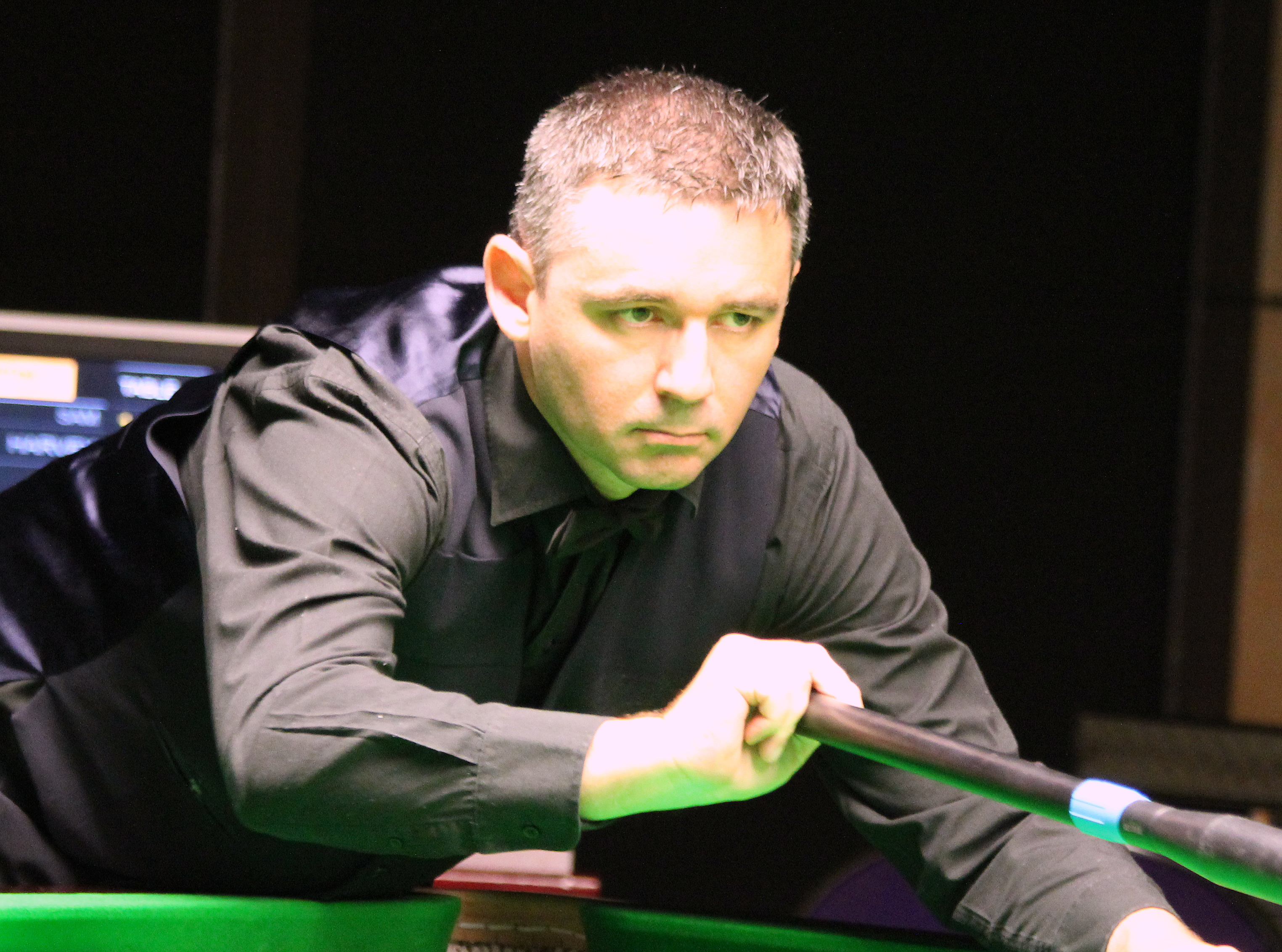 Alan McManus beim Paul Hunter Classic 2012